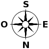 boussole avec nord et sud inversés